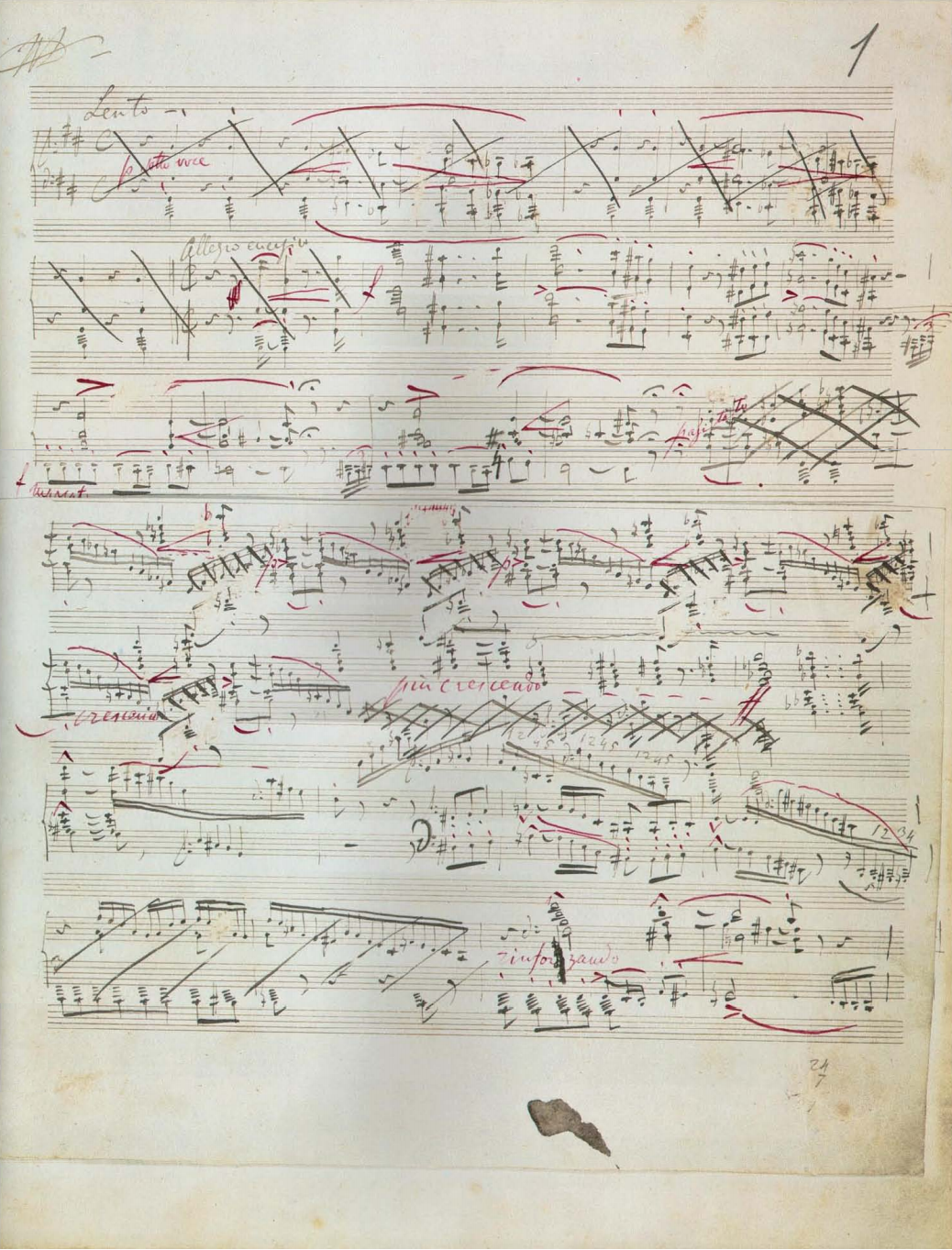 Partition autographe de la sonate en si mineur de Liszt